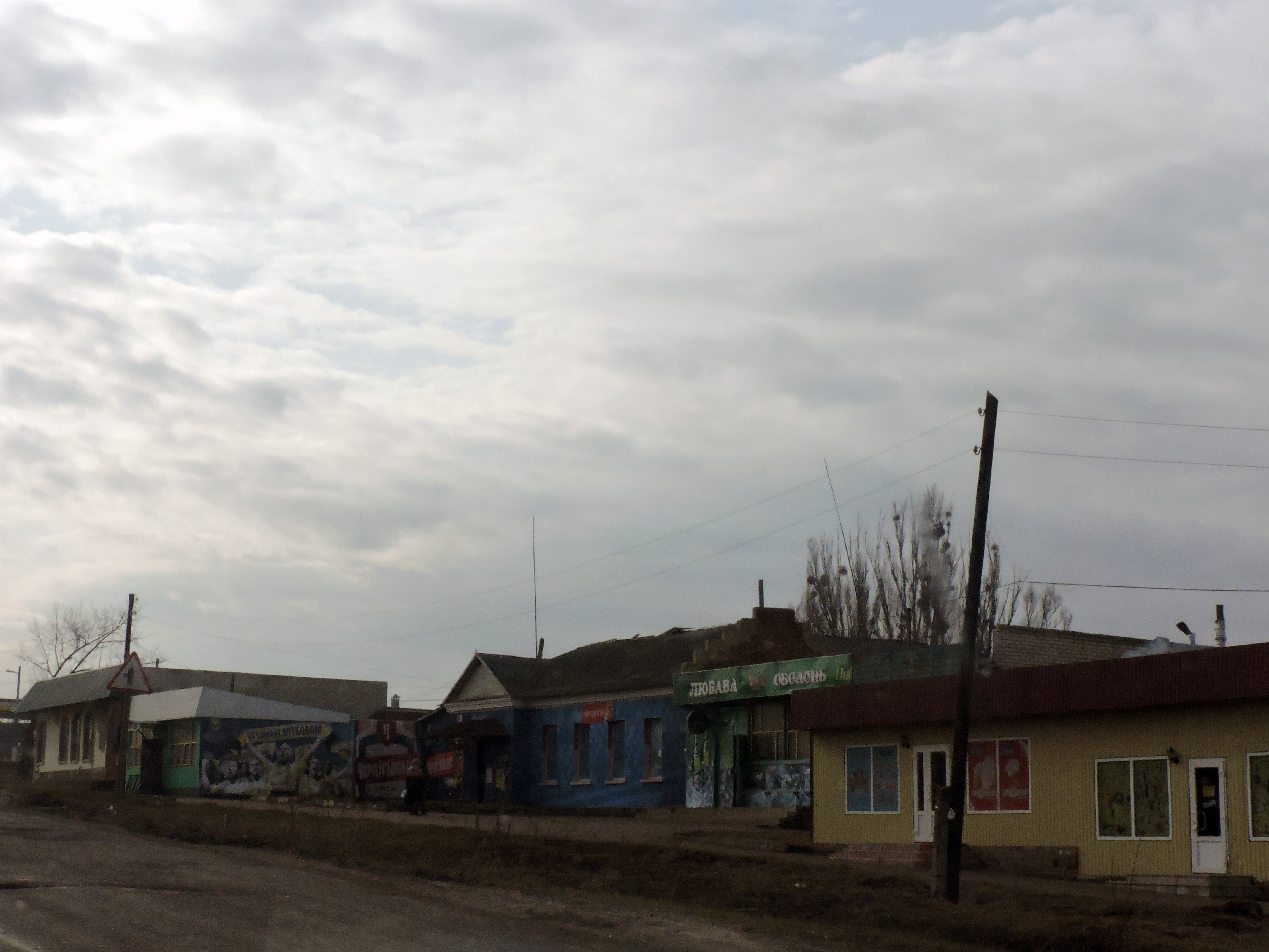 Магазини у центрі села Кам’янка